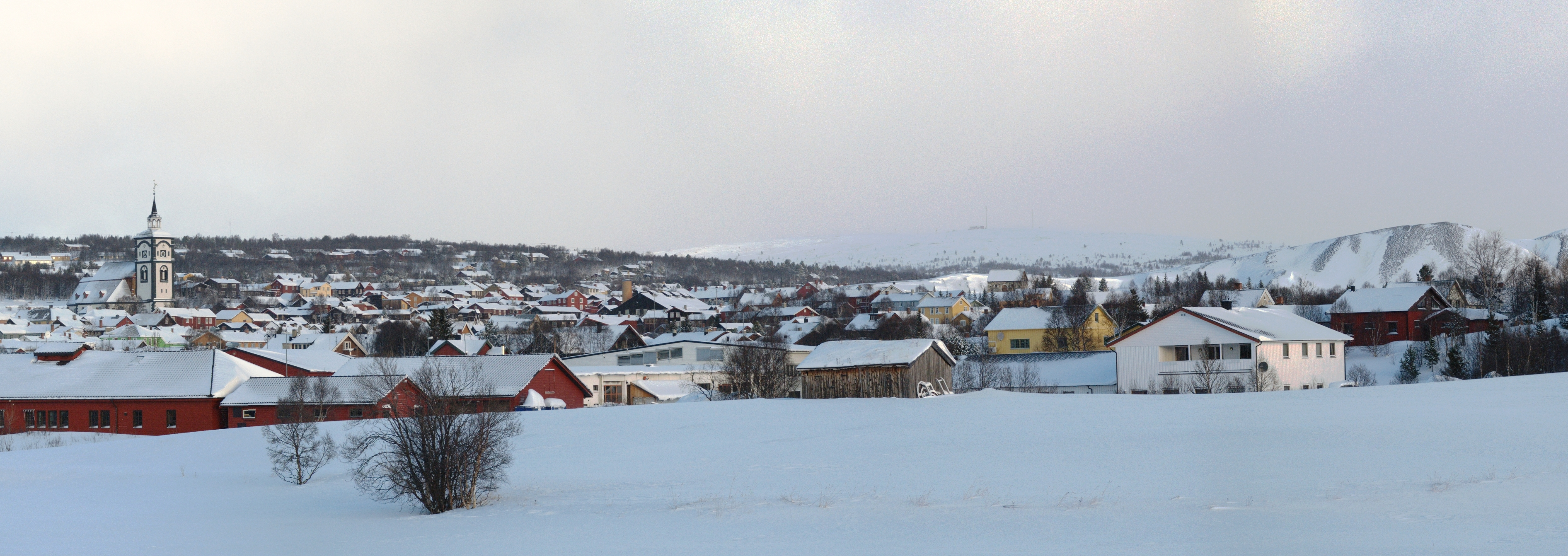 Røros